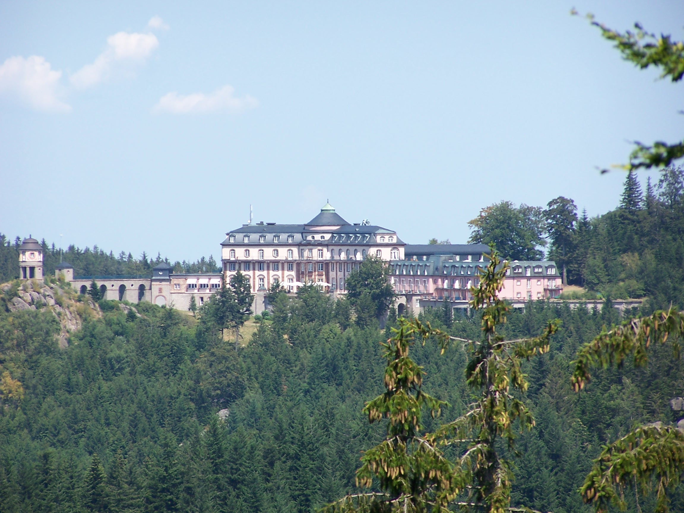 Bühlerhöhe 800 meter above Baden in the Black Forest